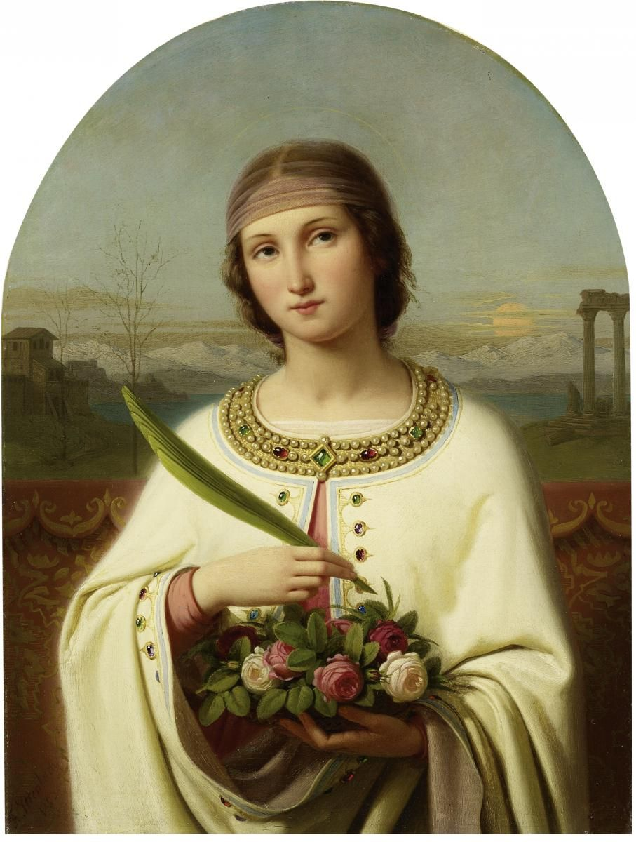 Doubliert